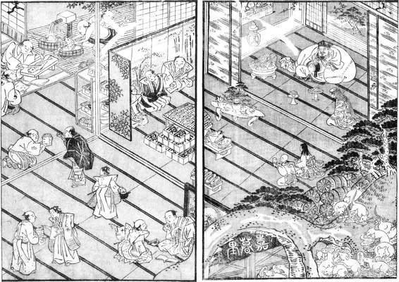 Kakurezato (隠里) from the Konjaku Hyakki Shūi (今昔百鬼拾遺)